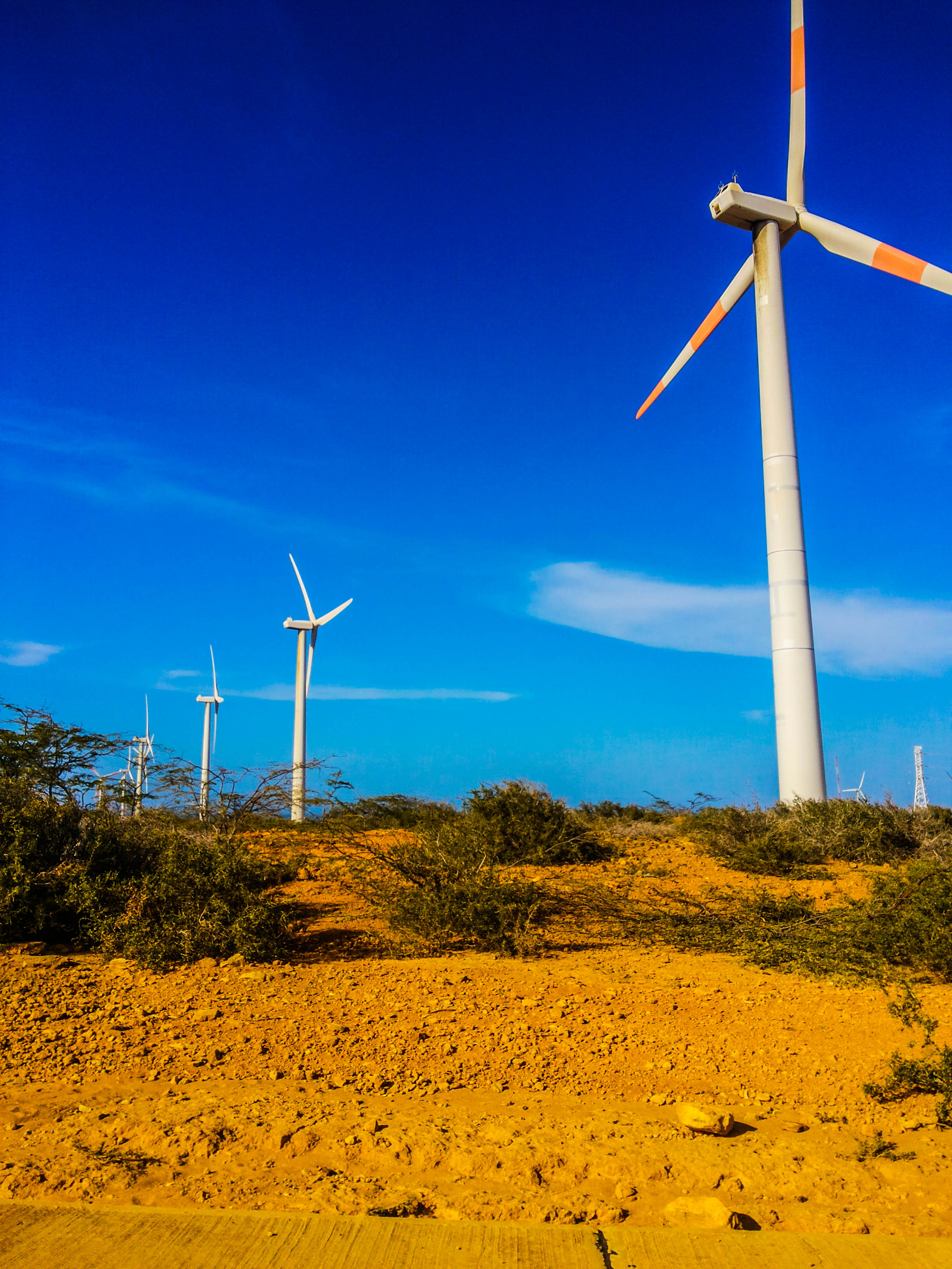 Molinos de viento (modernos), en el desierto de la Guajira.